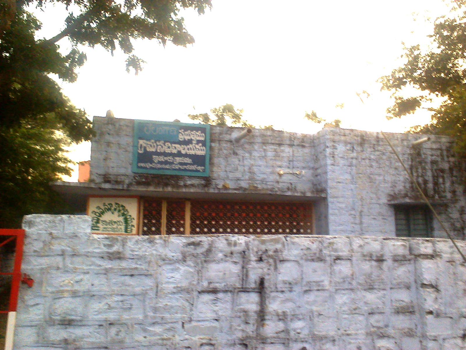 గ్రామ పంచాయతీ కార్యాలయం,క్యాతూరు